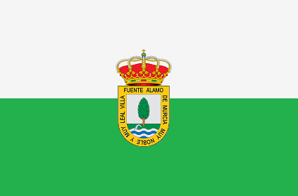 Bandera municipal de Fuente Álamo de Murcia. El 23 de enero de 2015, el Consejo de Gobierno de la Región de Murcia, aprobó la nueva bandera de Fuente Álamo de Murcia. La nueva bandera tiene una proporción 2:3; está dividida en dos franjas horizontales de igual tamaño siendo la inferior de color verde y la superior de color gris plata.